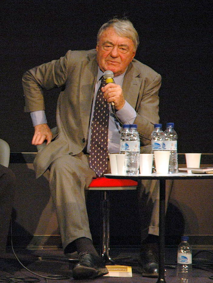 Jacques Mandelbaum & Marie-José Mondzain & Claude Lanzmann